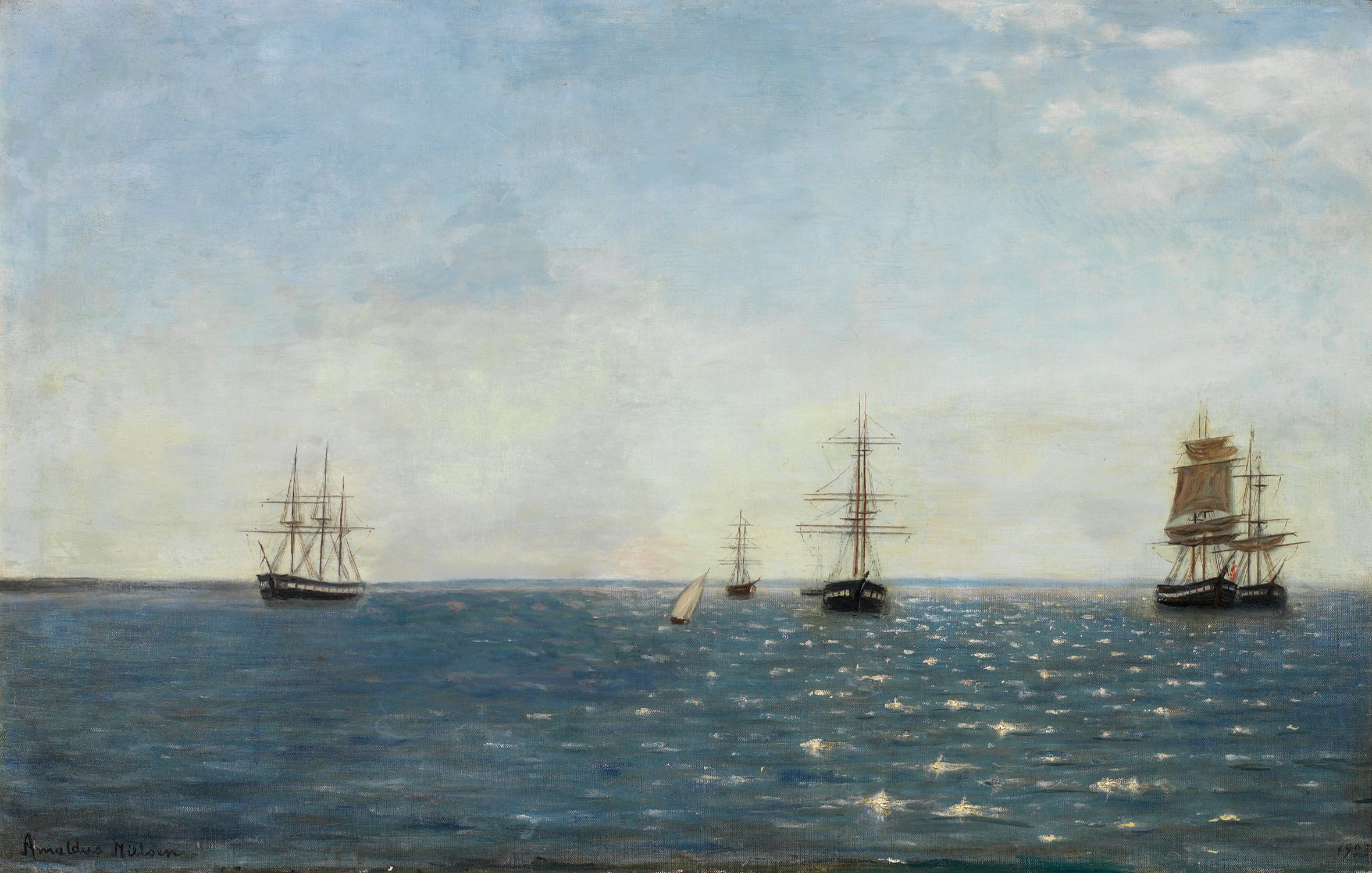 Ved Cadiz